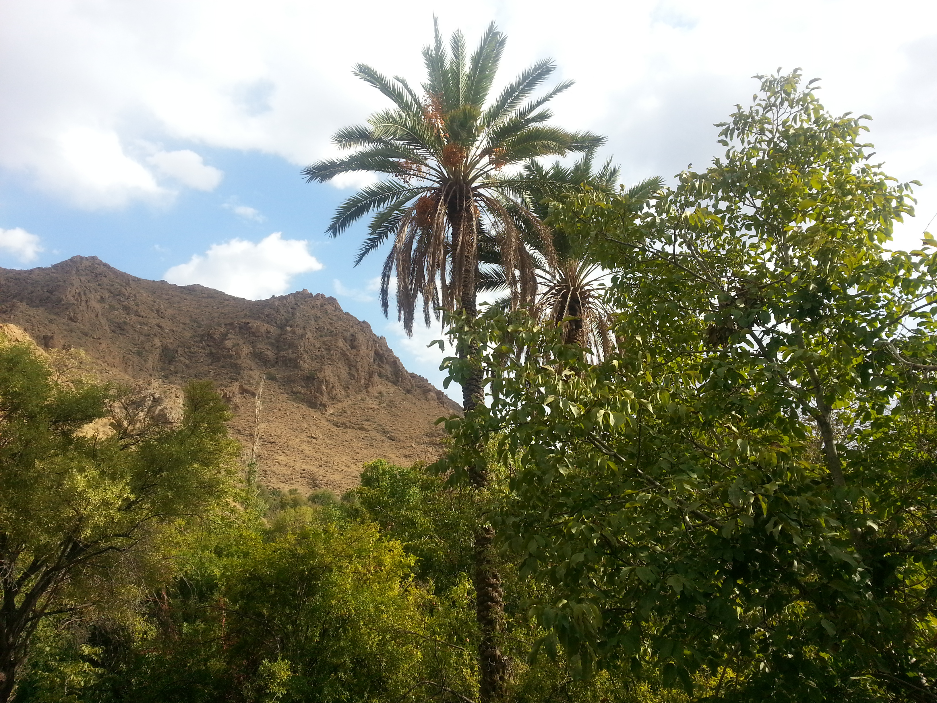 منطقه حفاظت شده روچان و رشد دو گونه سردسیری و گرمسیری در کنار هم بدلیل تلاقی اقلیم صحرا-سندی و خلیج -عمانی